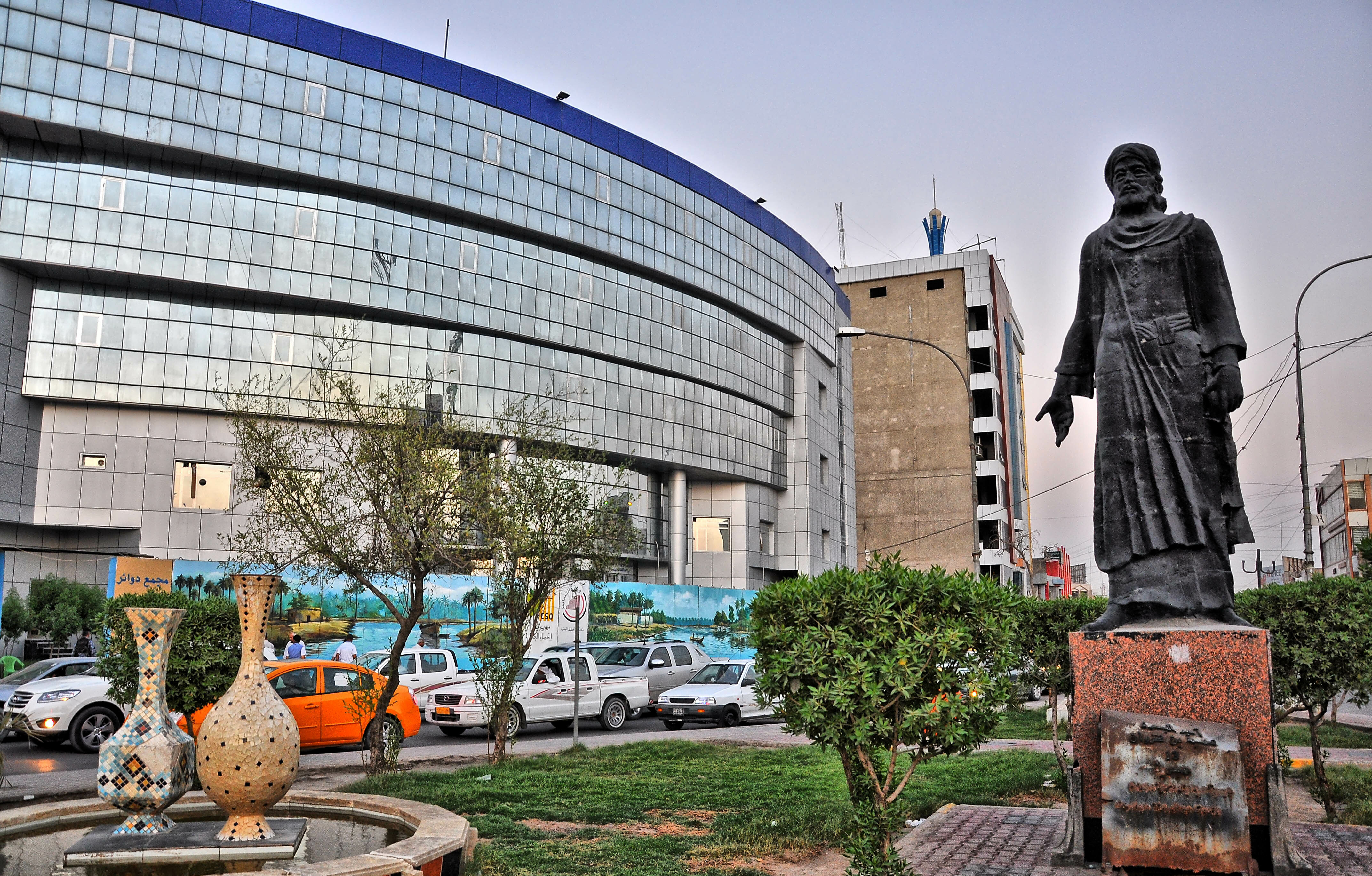 تمثال عتبة بن غزوان مدخل شارع الجزائر في البصرة